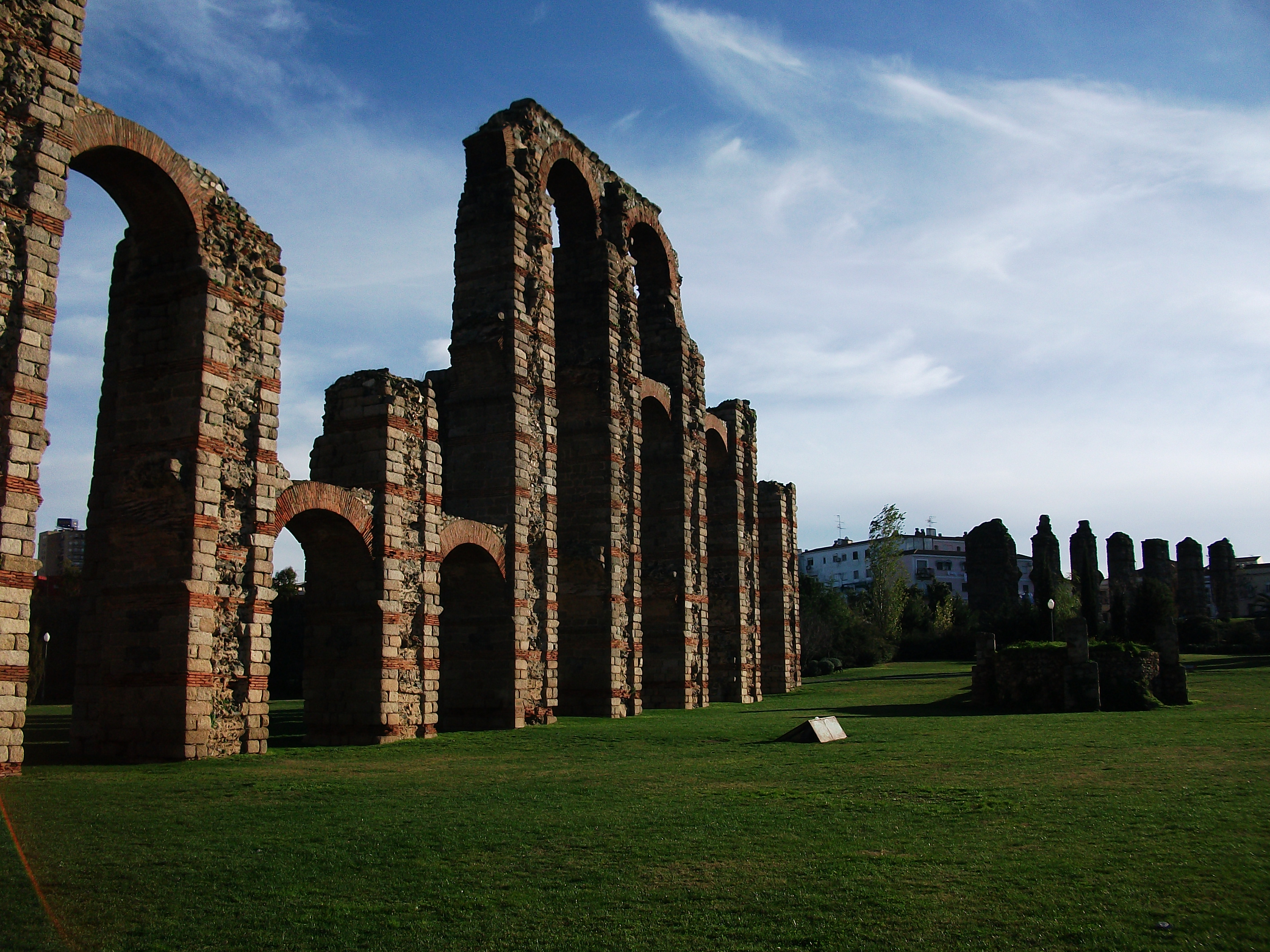 Acueducto romano de Mérida